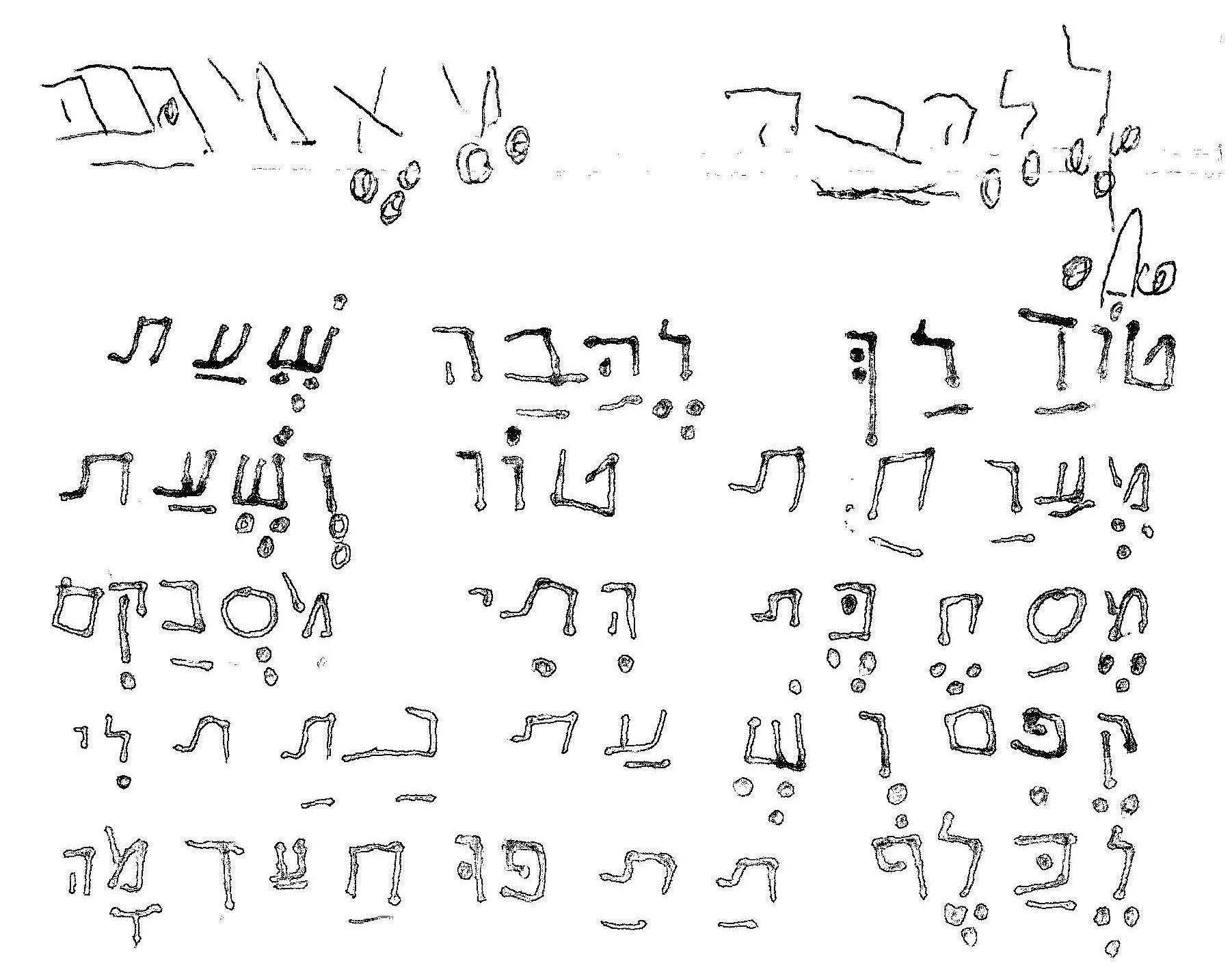 מכתב של ילדה בת חמש עם שגיאות כתיב